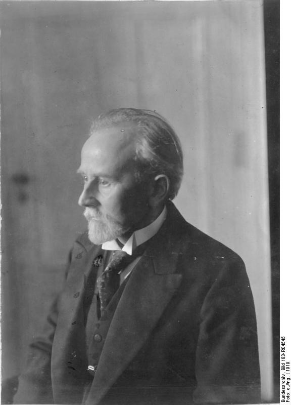 Scherl: Dr. Eduard David; Reichsminister ohne Portefeuille; Mitglied der deutschen Friedensdelegation, [Aufnahme 1919] 1649-19